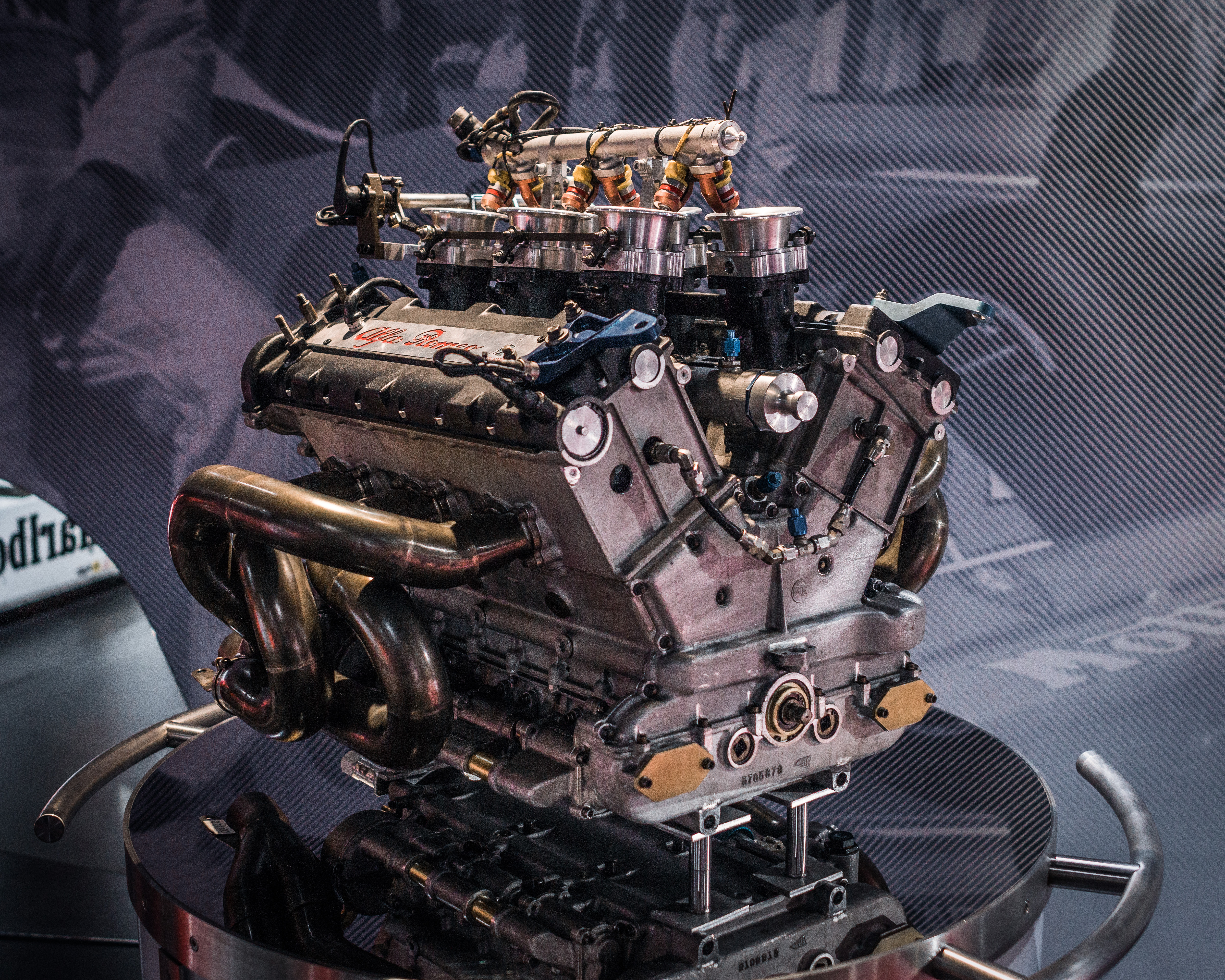 Motore in esposizione al Museo Storico Alfa Romeo di Arese (MI)